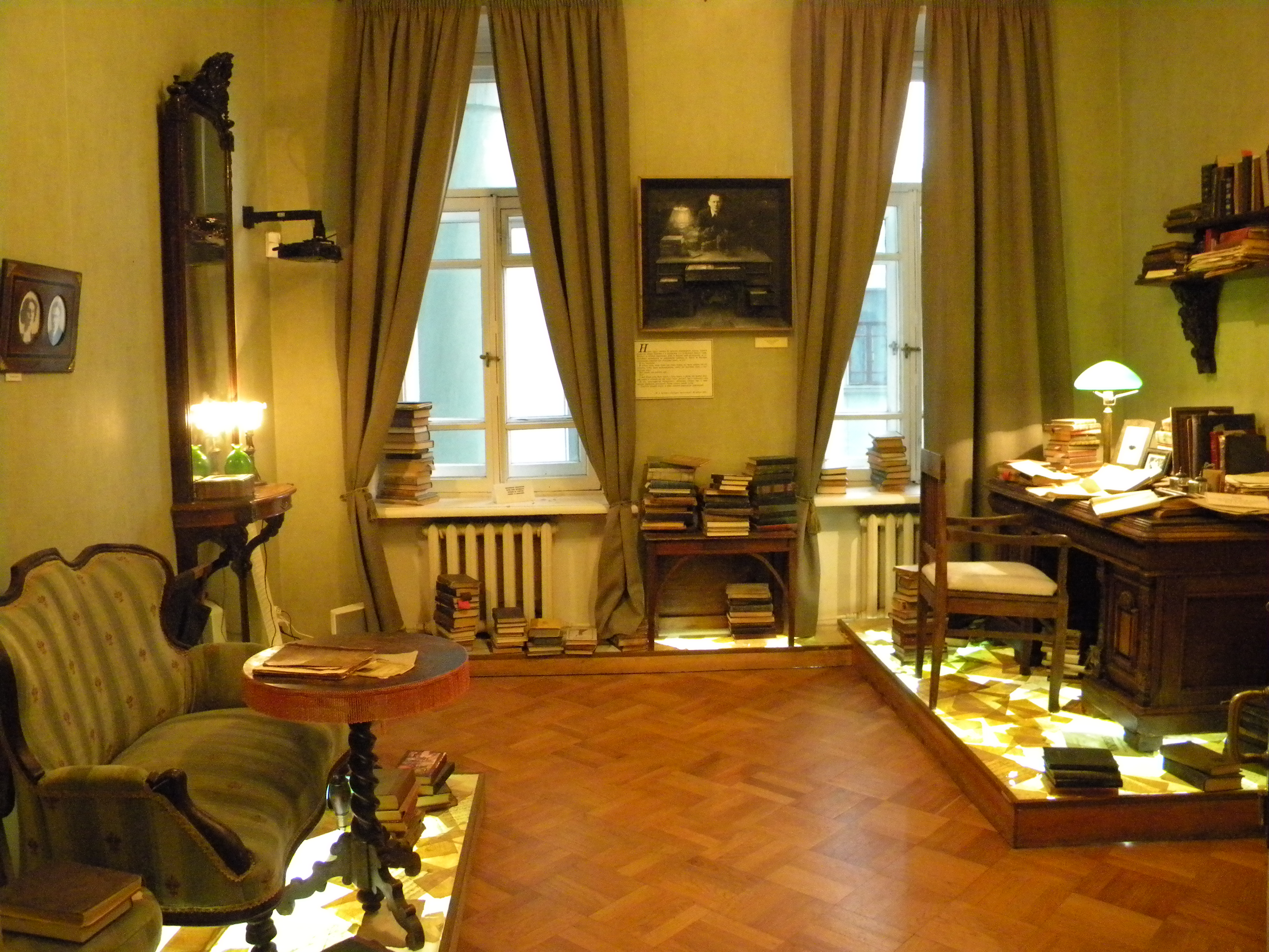 Bulgakov Museum